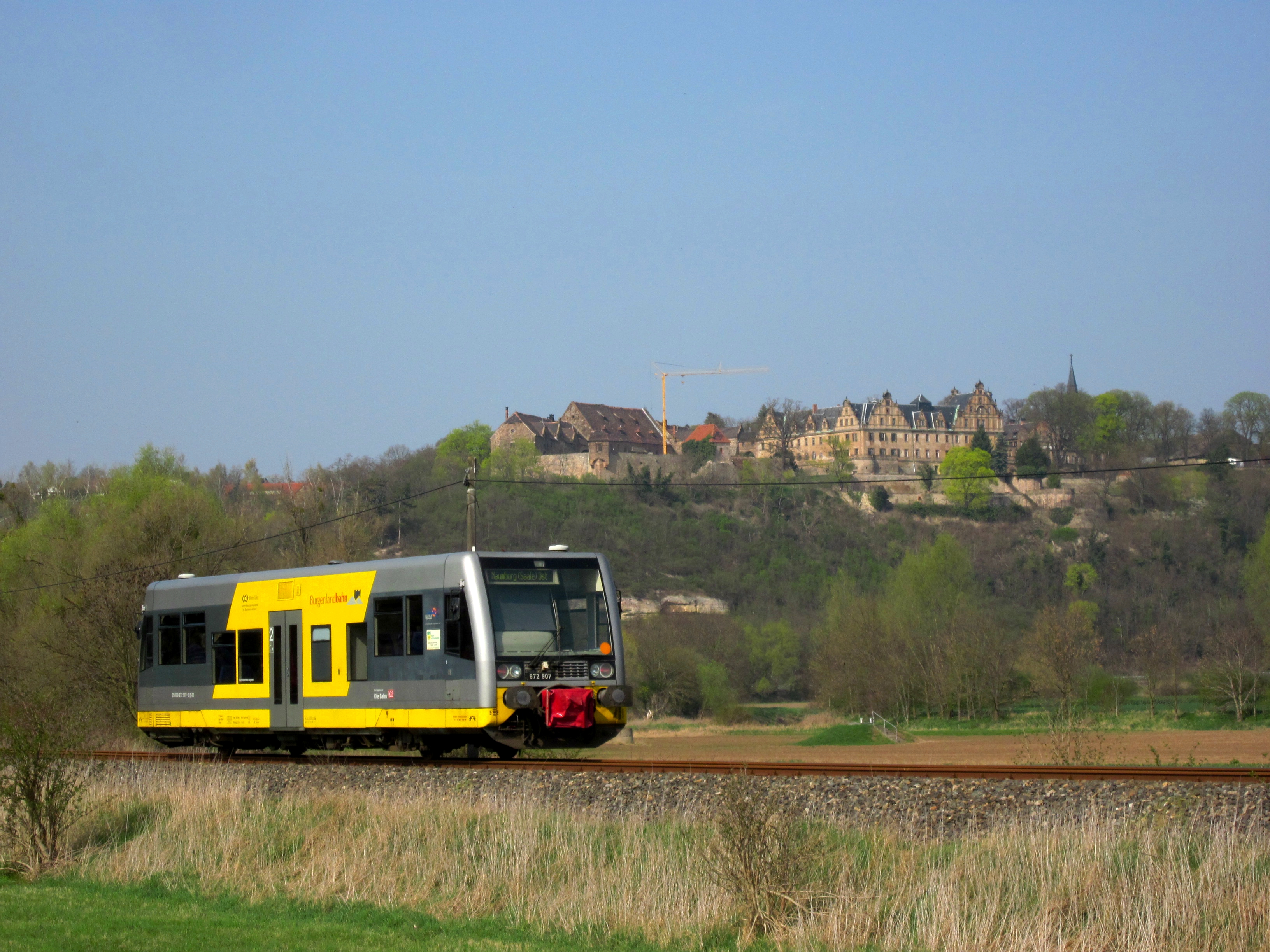 Zug der Burgenlandbahn im Unstruttal bei Zingst (Ortsteil von Vitzenburg, Stadt Querfurt, Saalekreis, Sachsen-Anhalt), im Hintergrund Schloss Vitzenburg